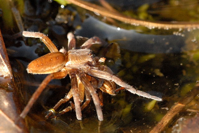 Dolomedes from Commanster, Belgian High Ardennes .